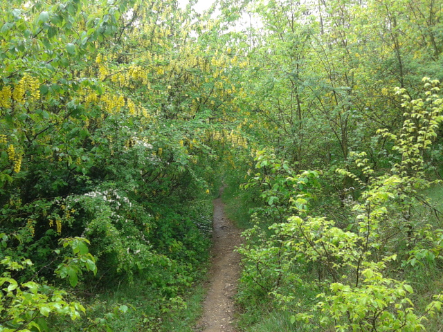 Sentiero del monte Salviano